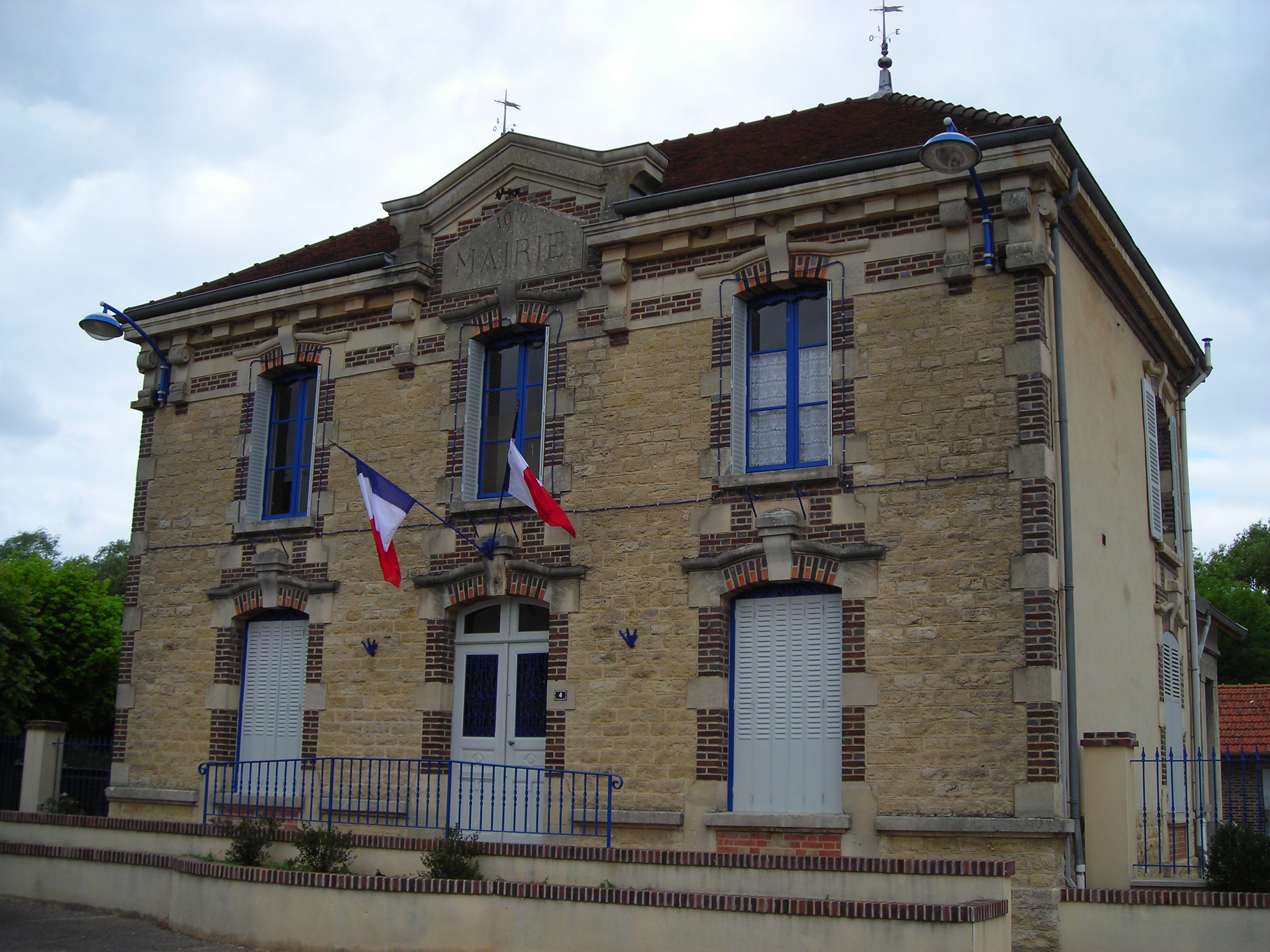 Mairie de Fontaine, dans l'Aube en France